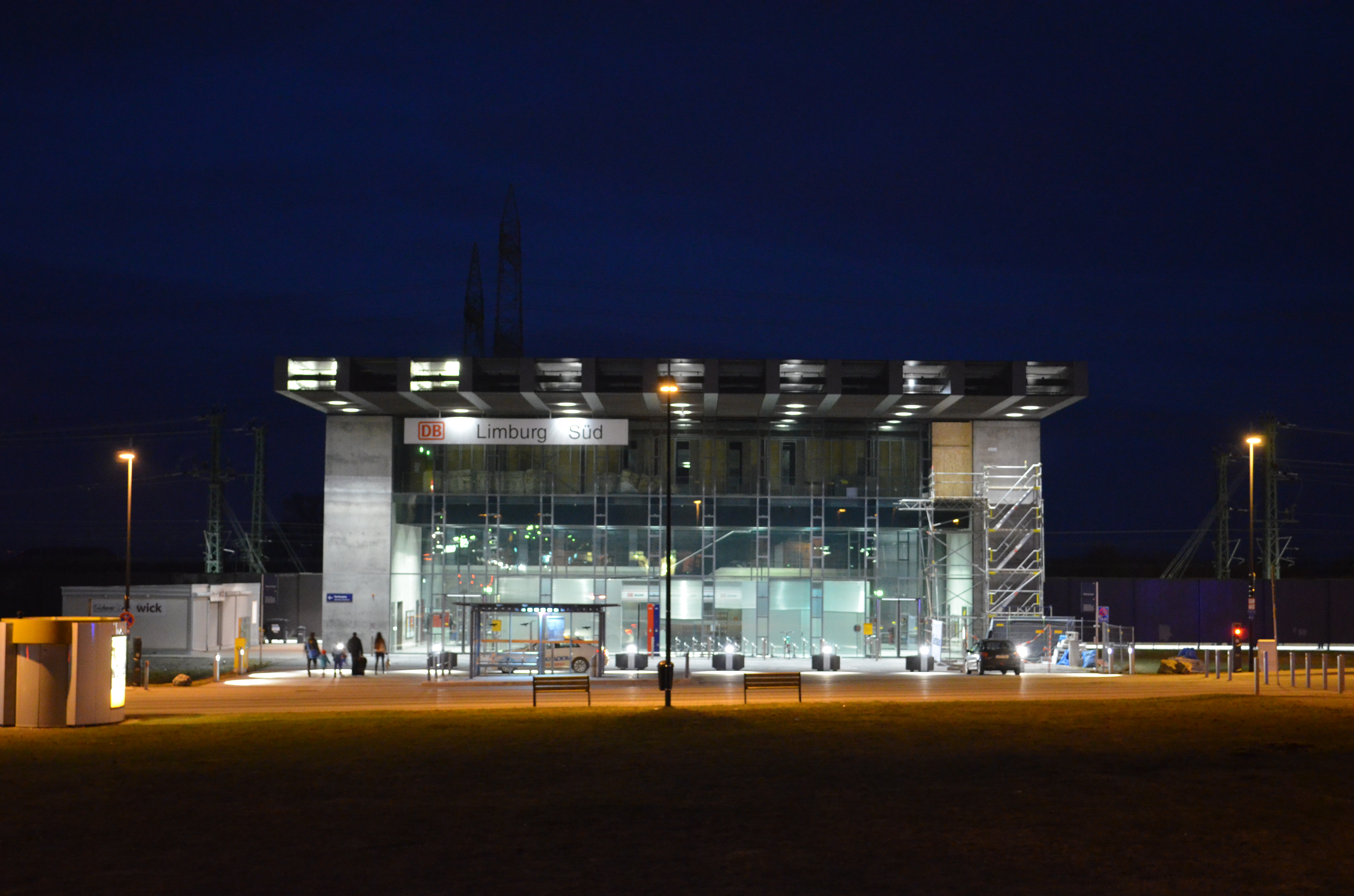 Bahnhof Limburg Süd bei Nacht